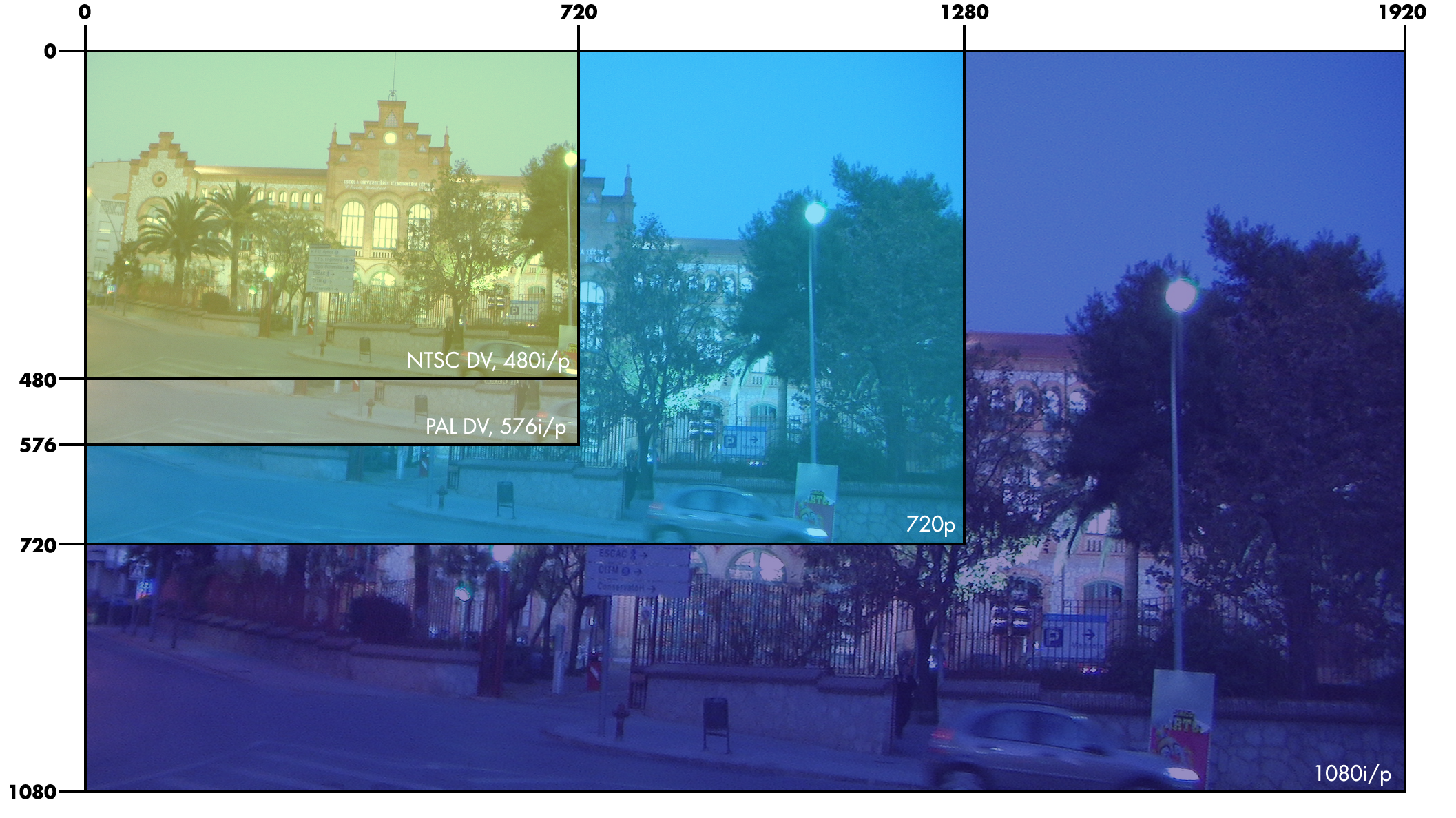 Gràfic comparatiu de diferents de resolucions de píxel horitzontal i vertical, exemplificant-ho amb una foto de la façana de l'Escola Universitària d'Enginyeria Tècnica Industrial de Terrassa (EUETIT - UPC). Es pot veure la diferència entre els sistemes amb relació d'aspecte 16:9 i 4:3 (les dues on es concreta el sistema PAL i NTSC).